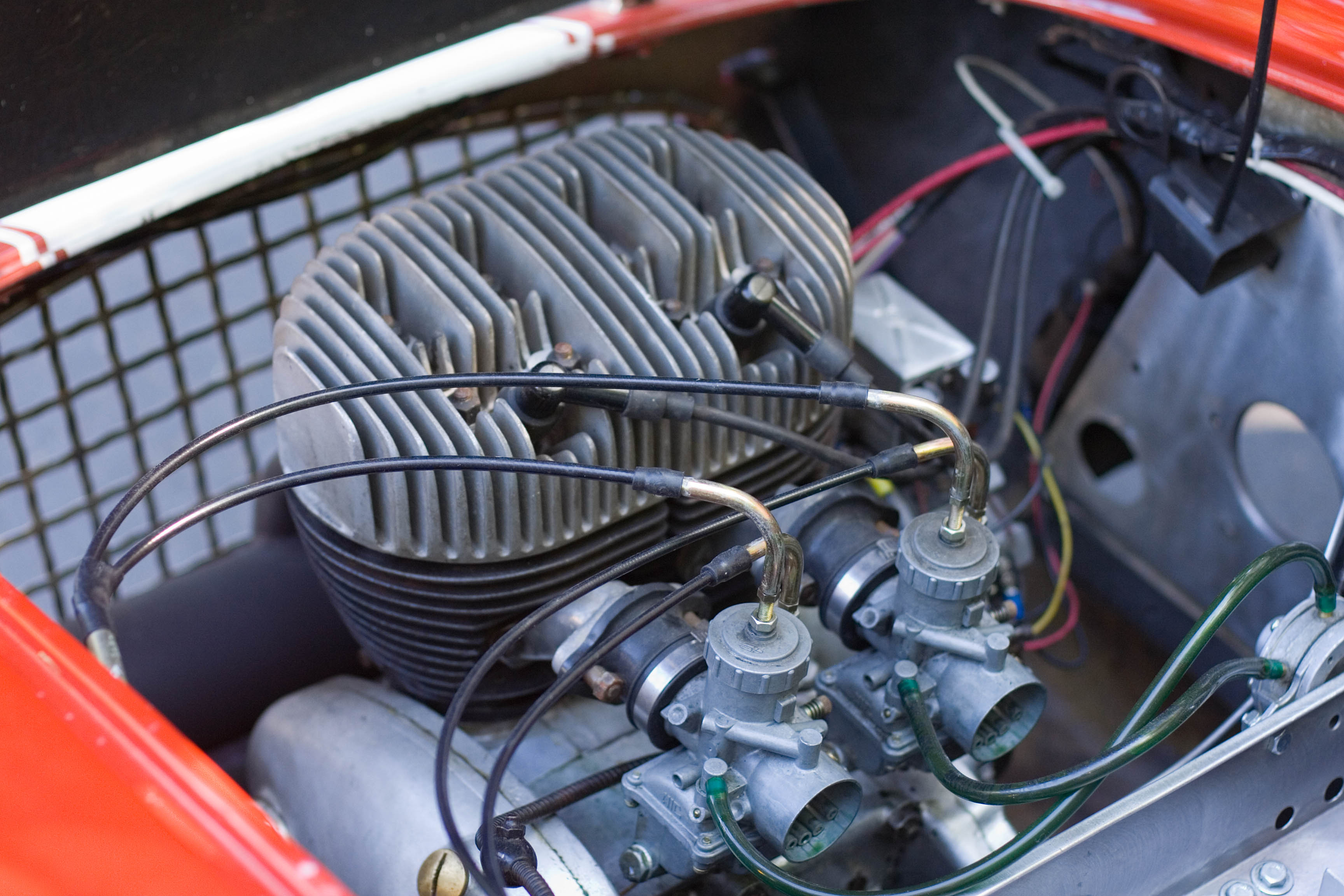 Berkeley SA328 Excelsior engine.